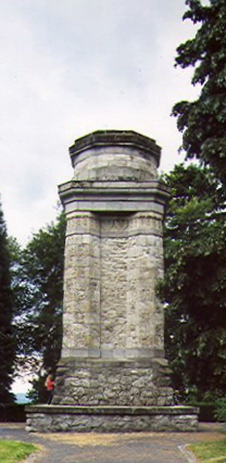 Bismarckturm Rengsdorf